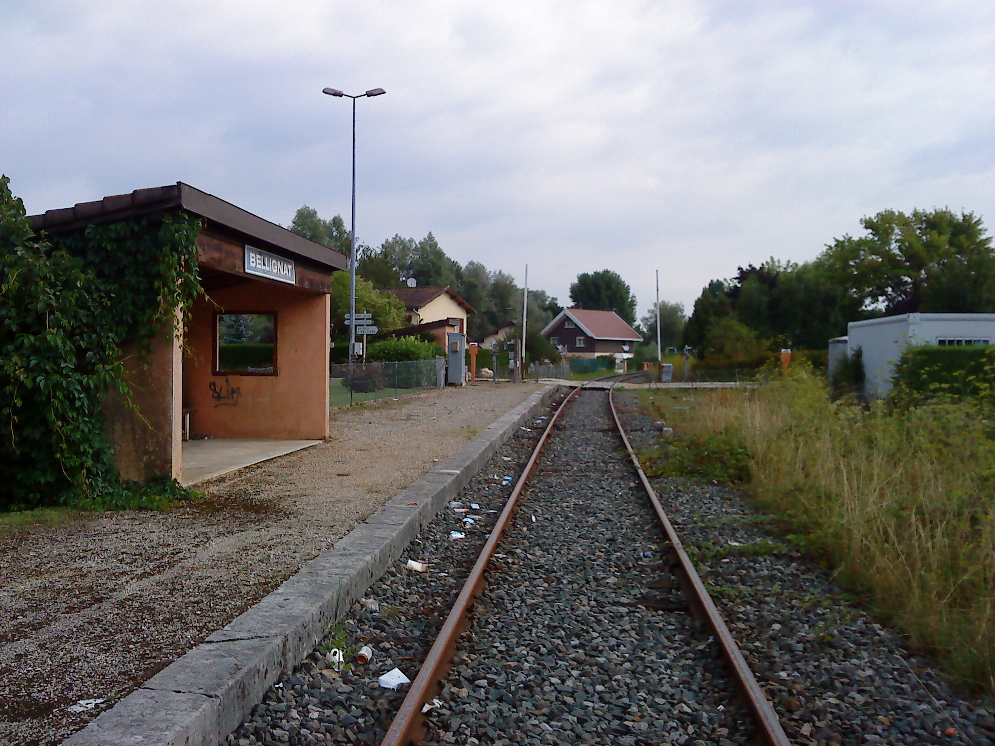 La gare de Bellignat est son quai. Prise de vue en direction d'Oyonnax.